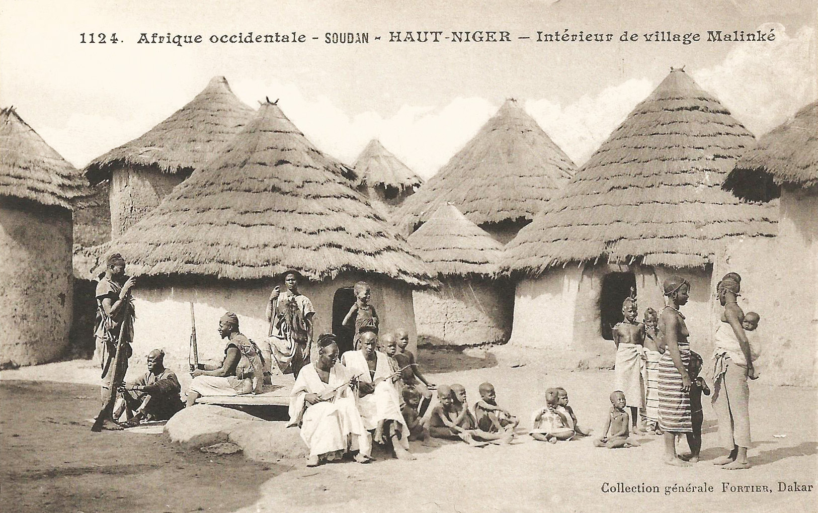 François-Edmond Fortier, Haut-Niger. Intérieur de village Malinké (AOF). Afrique Occidentale - Soudan.